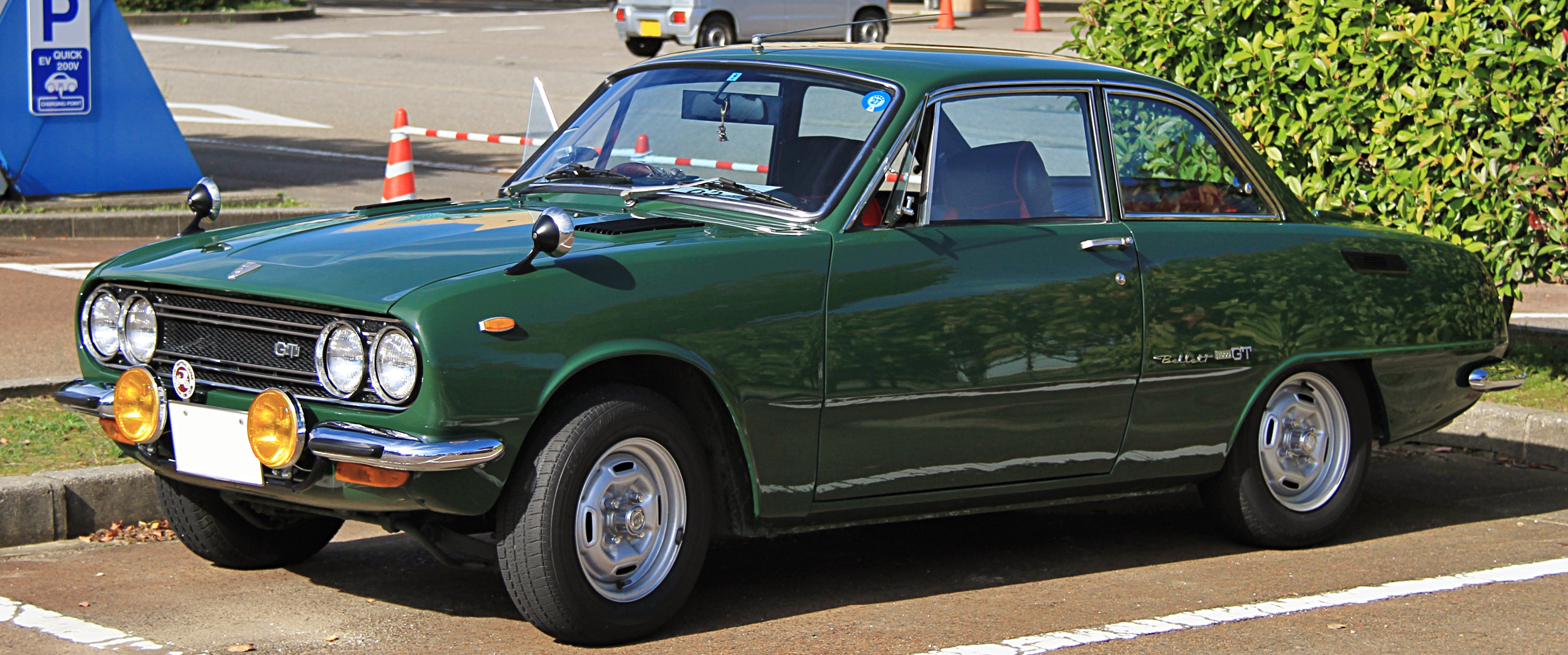 Isuzu Bellett